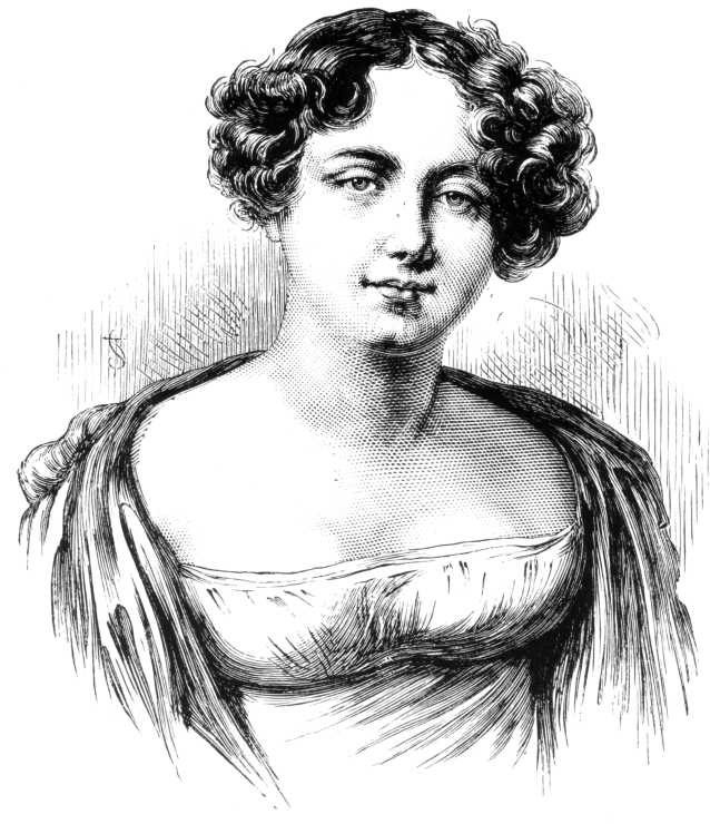 Lady Jane Griffin (Franklin) (1791-1875), engraving